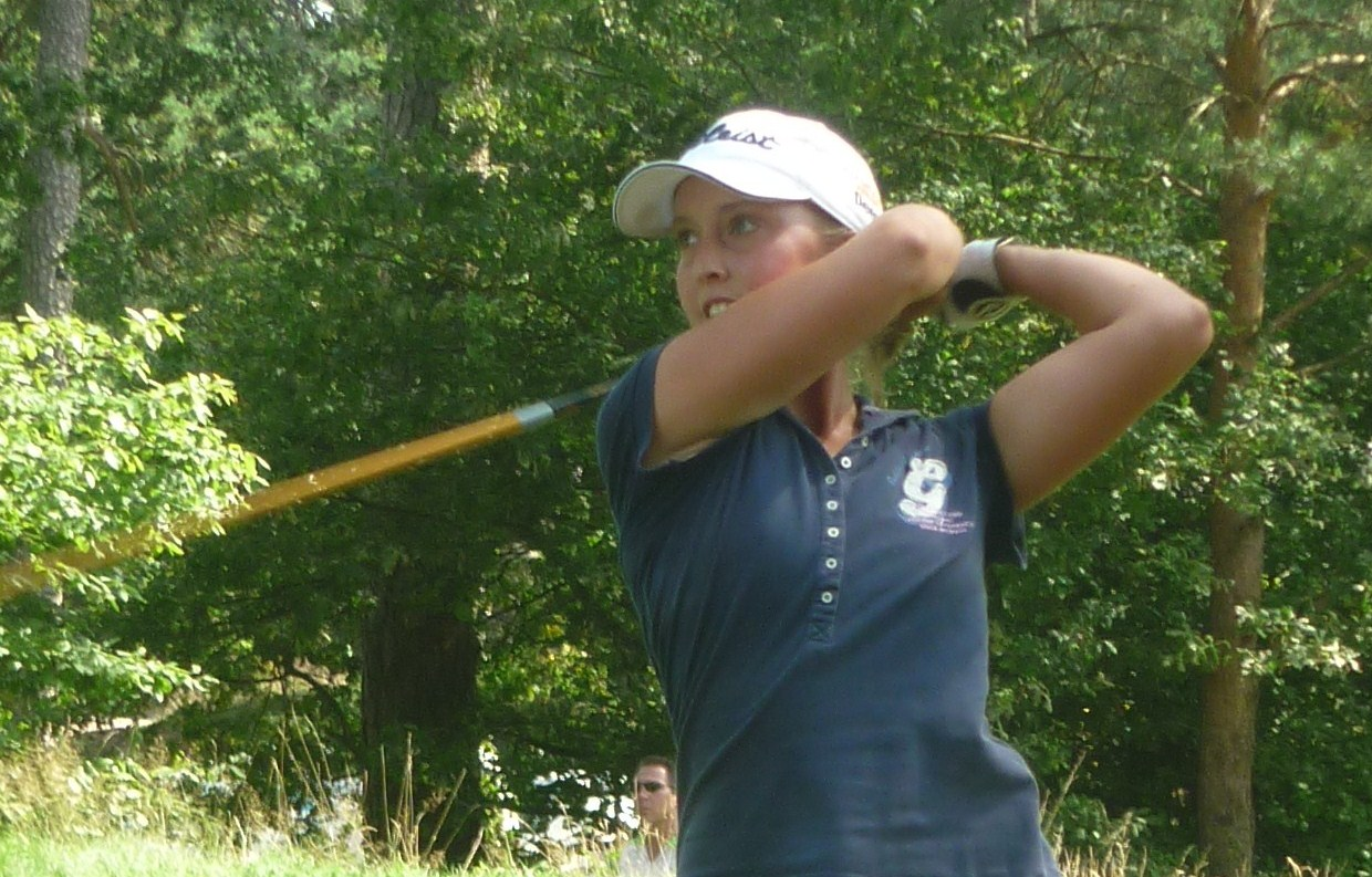 Ileen Domela Nieuwenhuis, winnaar Nationaal Open 2012